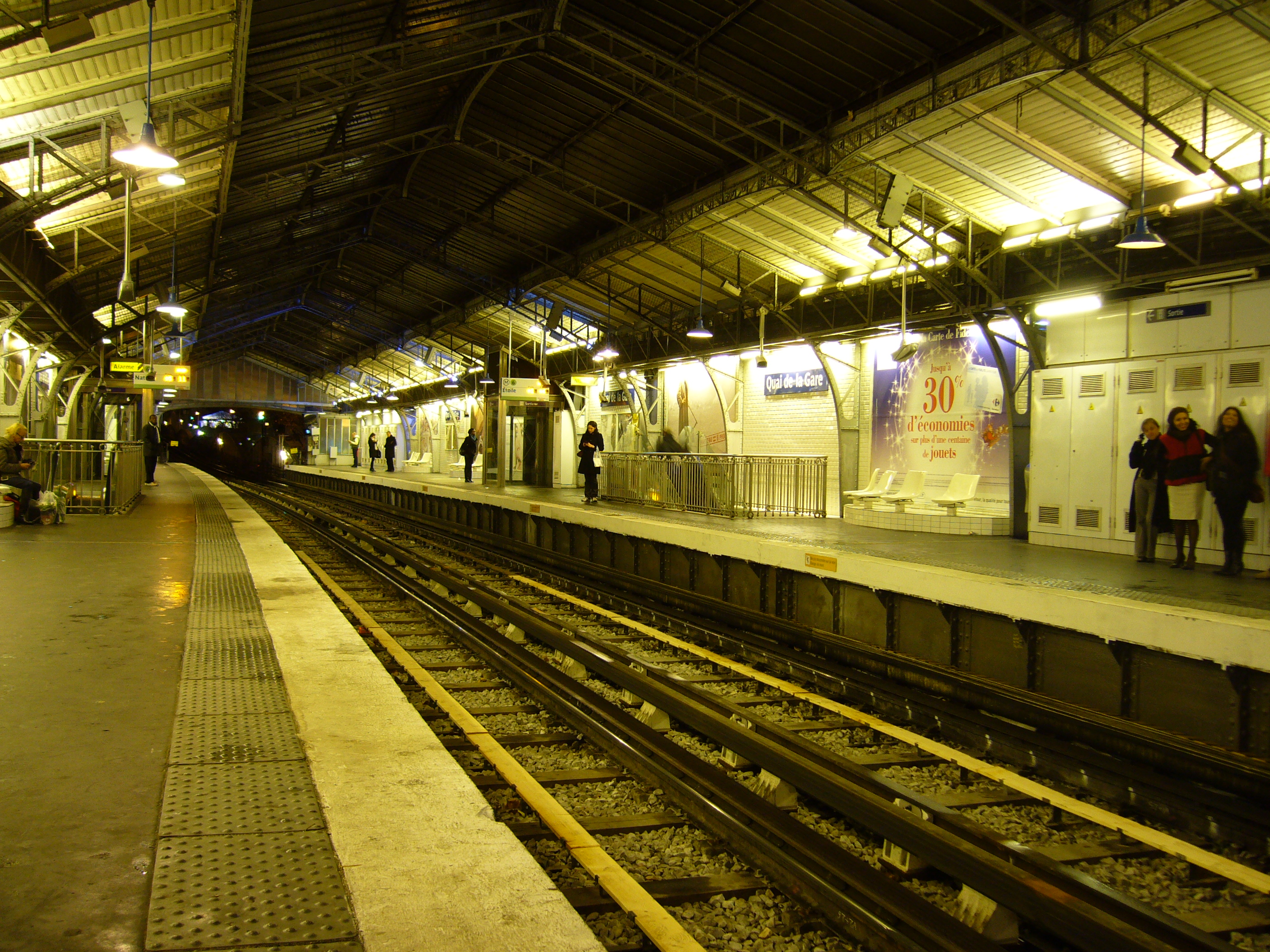 Vue de la station Quai de la gare sur la ligne 6 du métro de Paris.